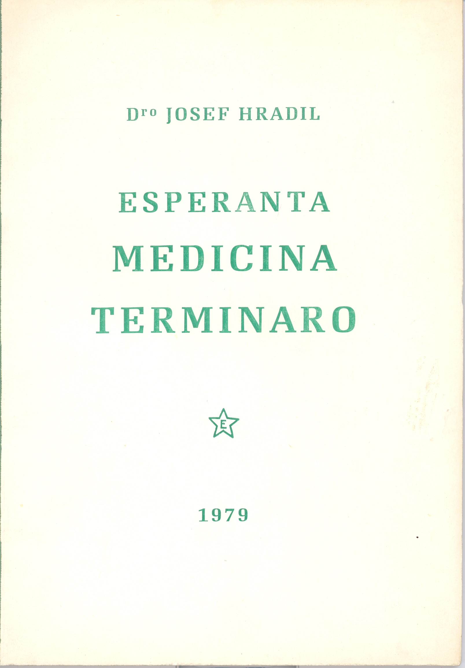 Esperanta medicina terminaro. Ĉefa Kompilinto: D-ro Josef Hradil. Universala Medicina Esperanto-Asocio, 1979. La kovrilo.